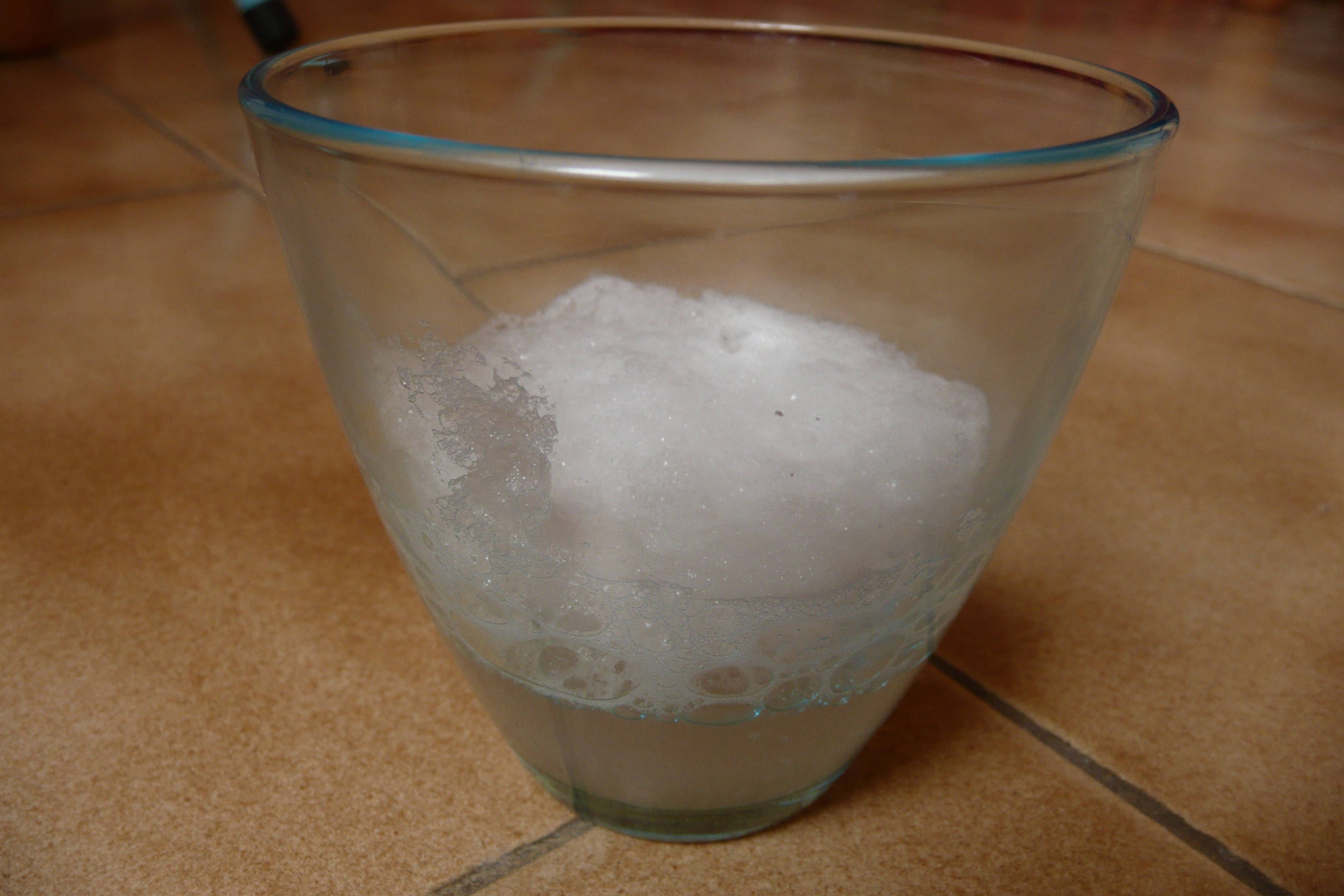 Saponine de la quinoa (toute la mousse recueillie du lavage de 500 grammes).